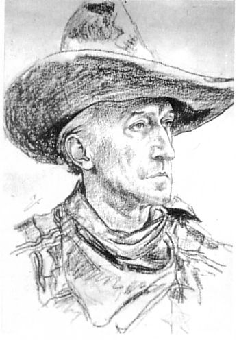 Vittorio Güttner (1869–1935), gezeichnet von Wilhelm Emil "Elk" Eber (1892– 1941)